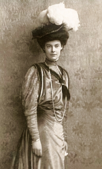 Kronprinzessin Cecilie von Preussen